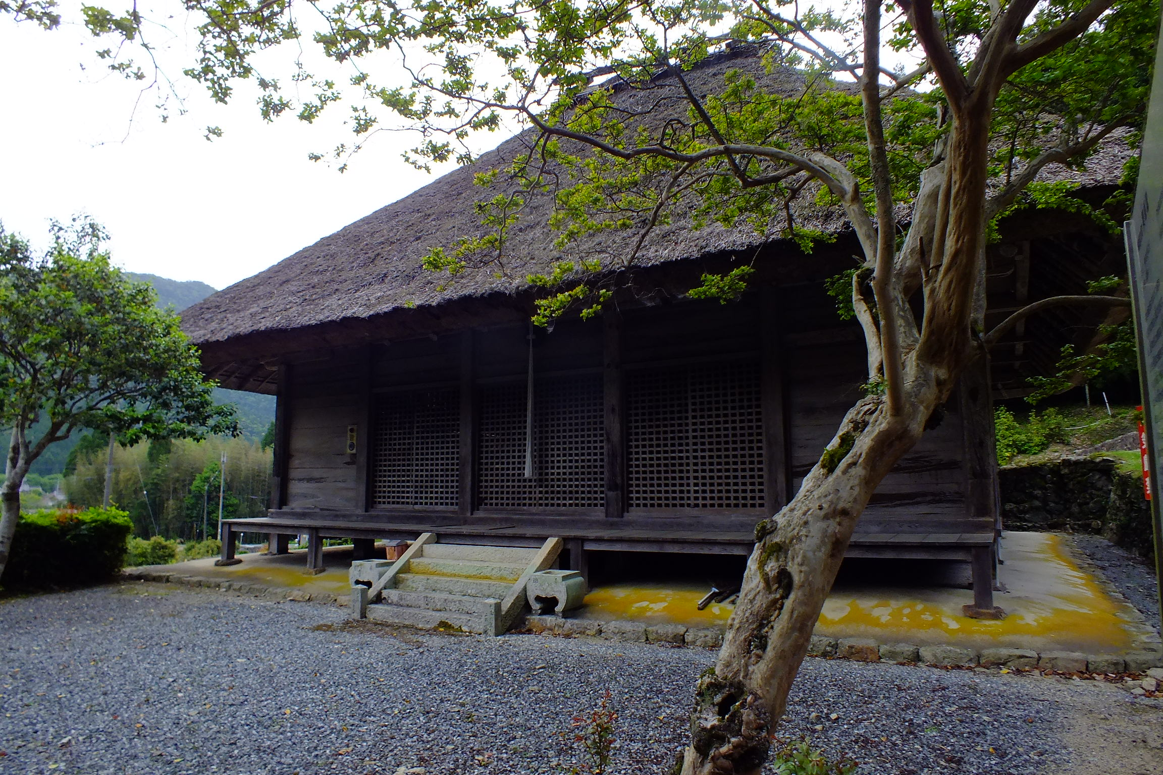 山本薬師堂 所在地 兵庫県丹波市山南町山本628番地 山号 野瀨倉山 院号 佛光寺藥師如來堂 （仏光寺薬師如来堂） 中興年 1395年（応永2年） 正式名 野瀨倉山佛光寺 藥師如來堂 別称 山本の薬師堂